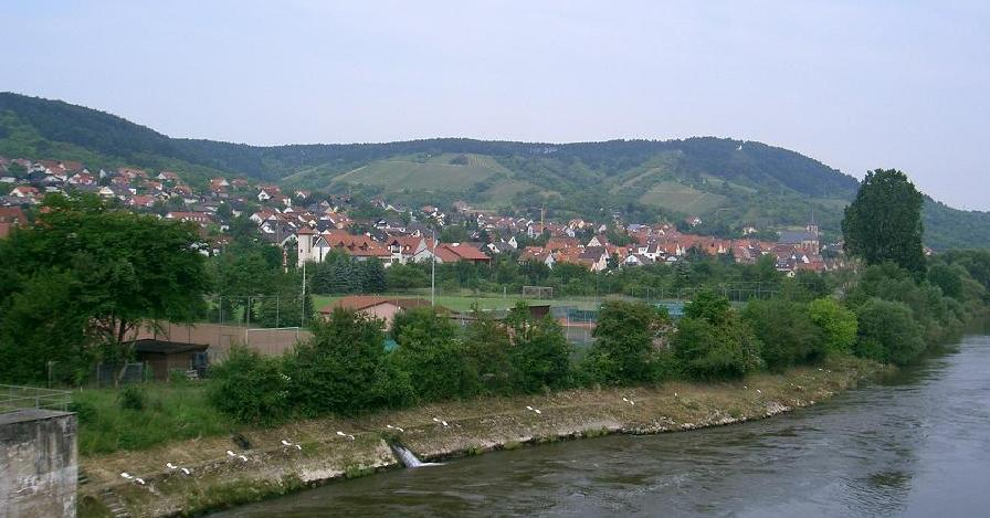 Erlabrunn